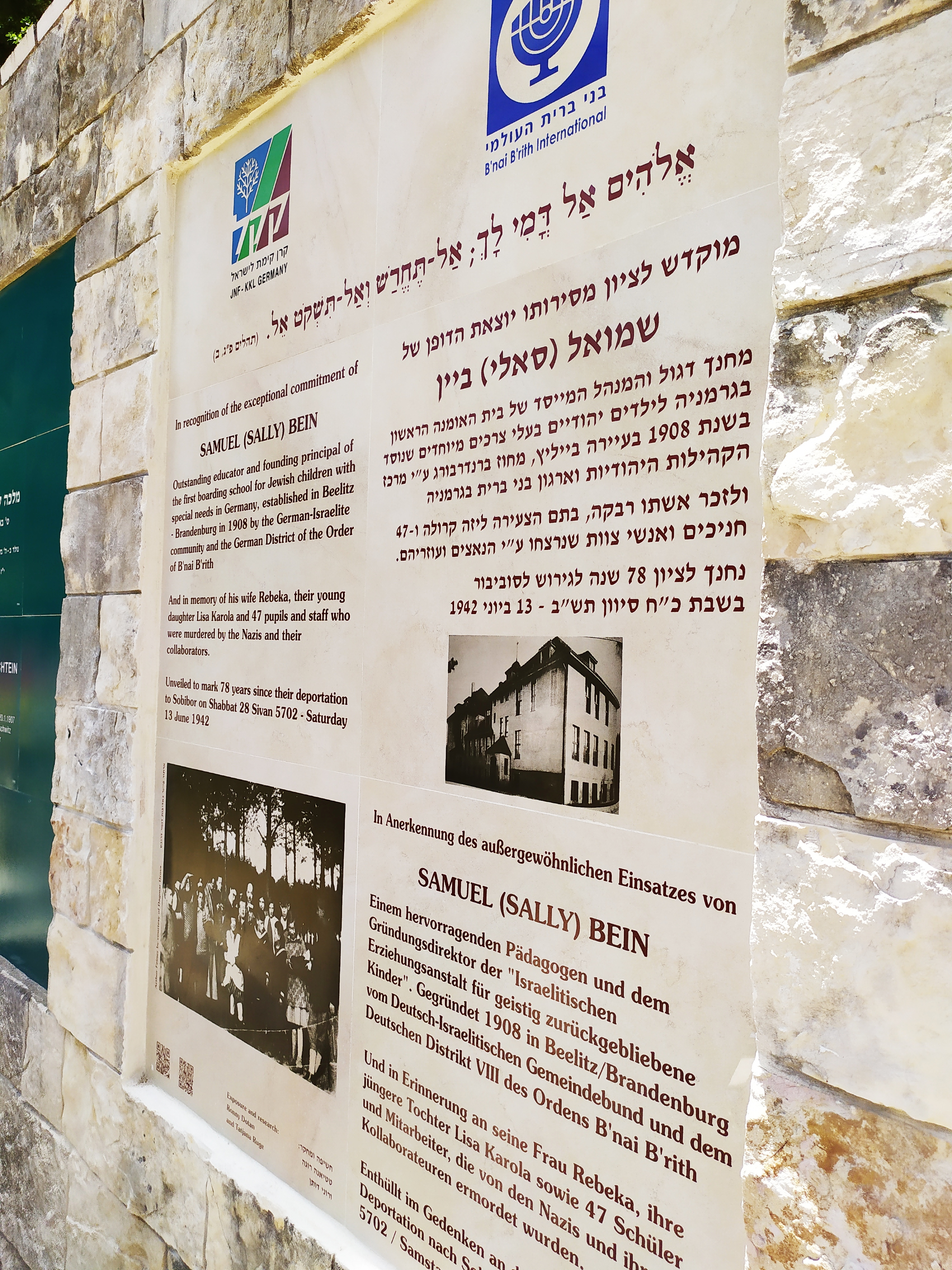 הקרן הקיימת לישראל וארגון בני ברית קיימו טקס, בו הסירו את הלוט מעל לוח זיכרון שהוצב ביער הקדושים ליד ירושלים, לאחר שרוני דותן הביא לידיעתם את סיפורם של הזוג ביין.